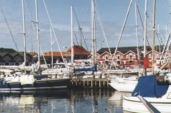 Skagen harbour.jpg Harbour in Skagen, Denmark.. Photographer: Dan Simon